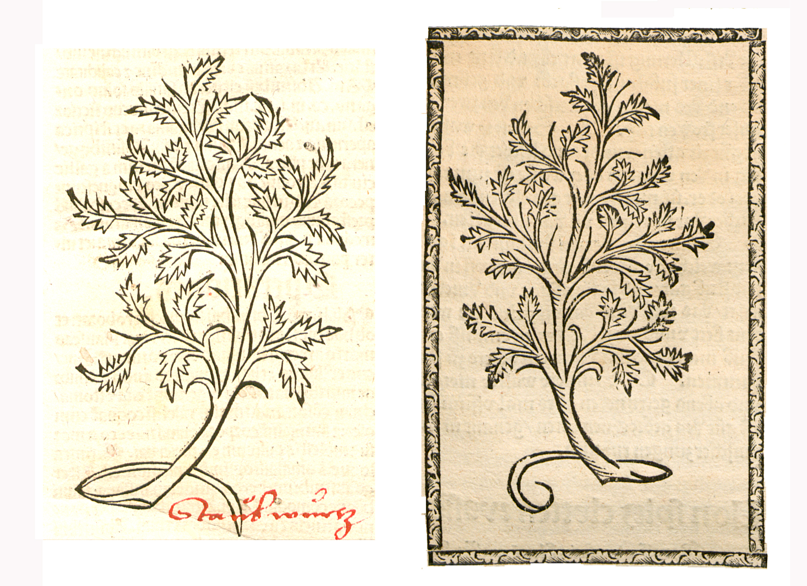 Abbildung von Schoß Wurtz (Artemisia abrotanum)